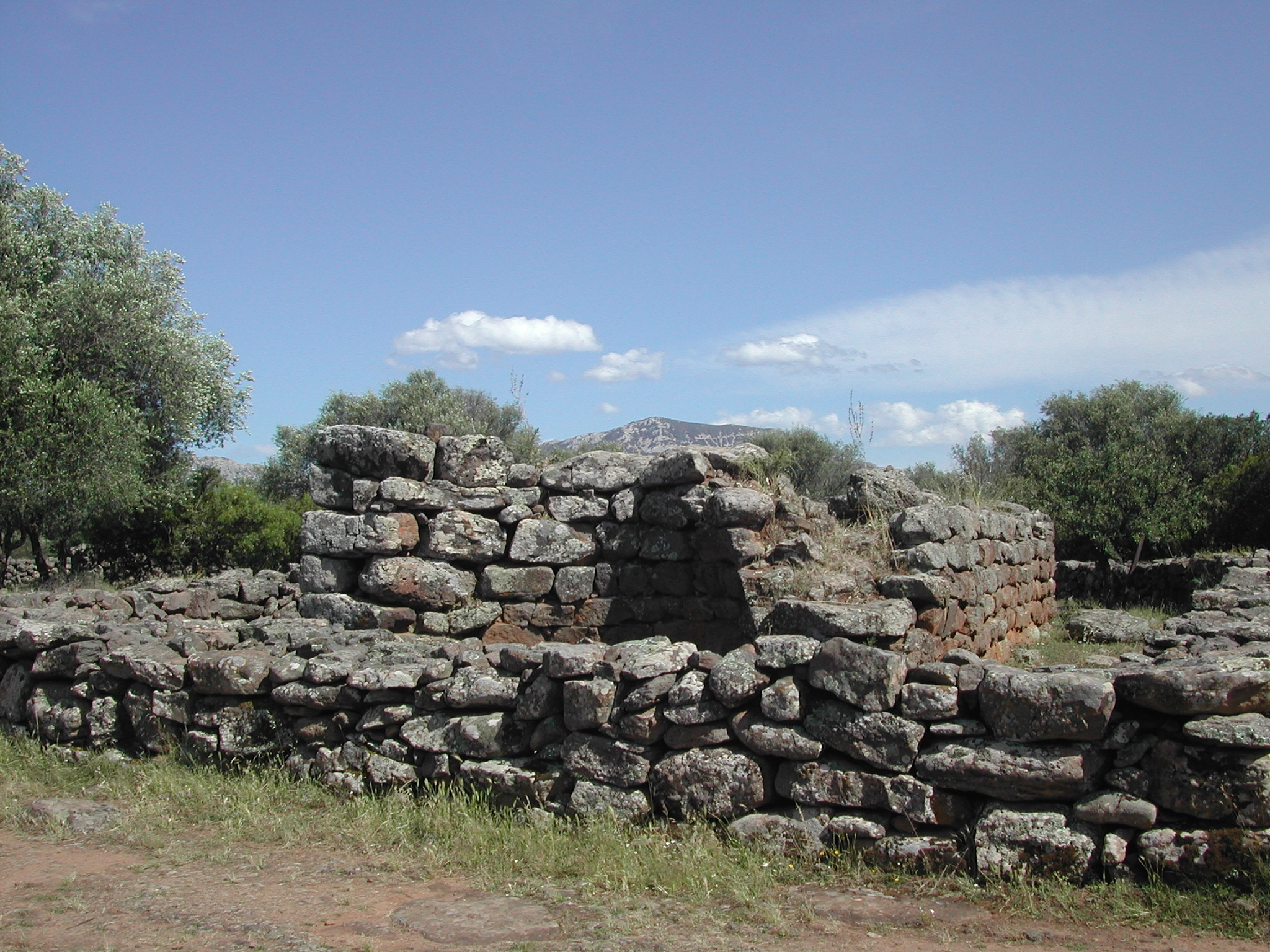 Il villaggio archeologico di Serra Orrios